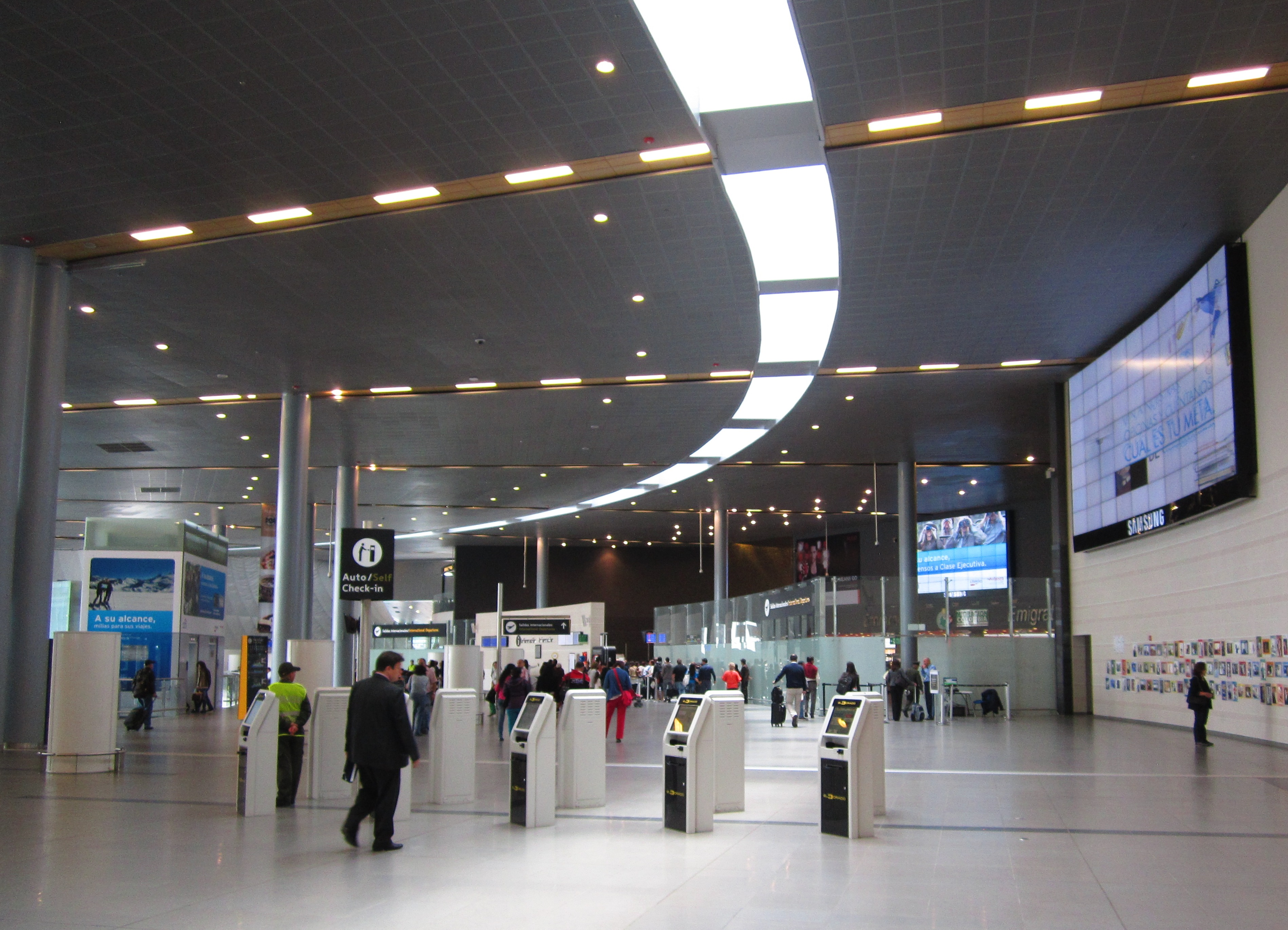 Interior del nuevo Aeropuerto de Bogotá en 2013.